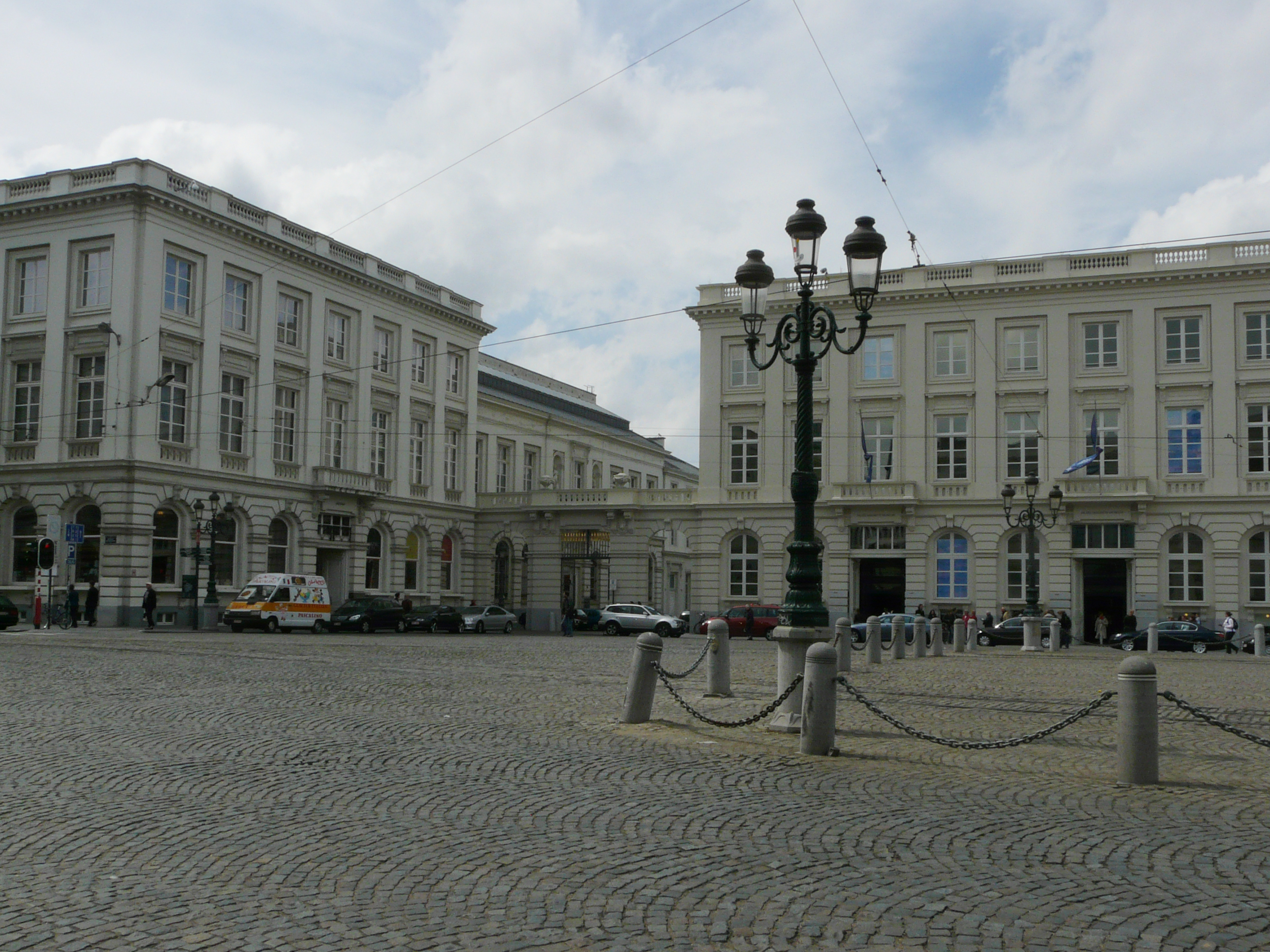 Musee Magritte Museum